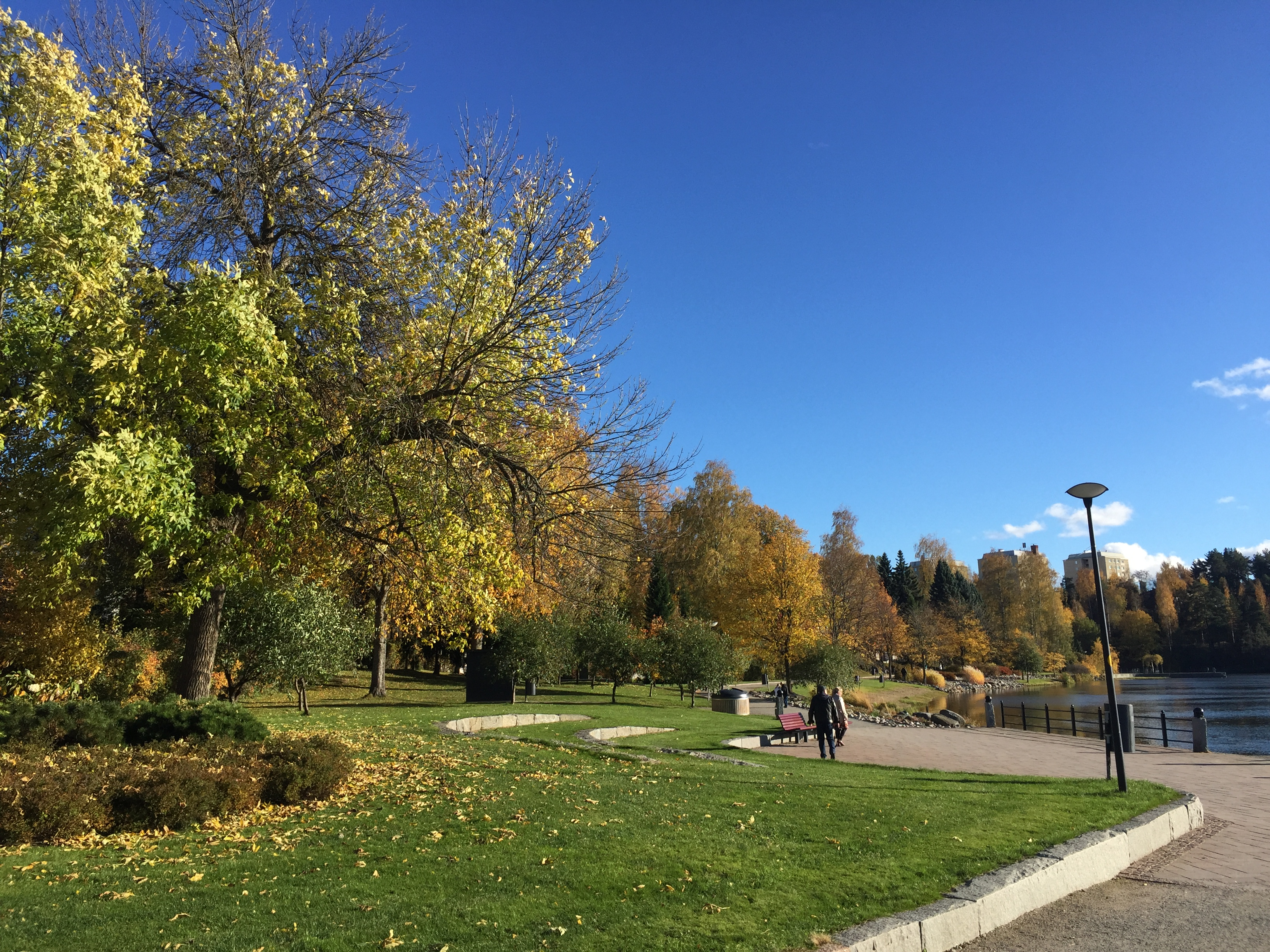 Valkeisenlampi, Niirala, Kuopio